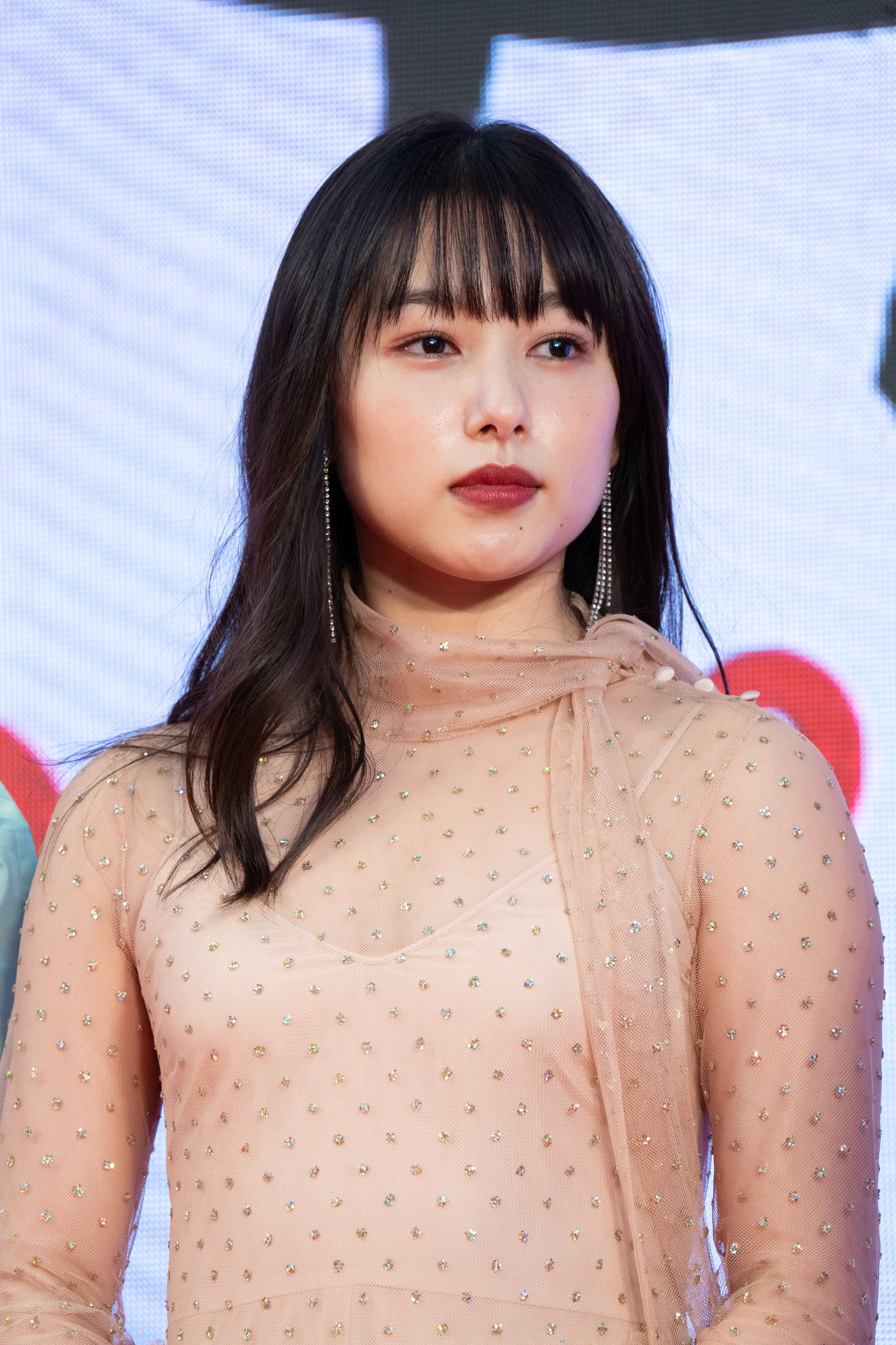 第32回 東京国際映画祭 オープニングセレモニー 桜井日奈子 (殺さない彼と死なない彼女)